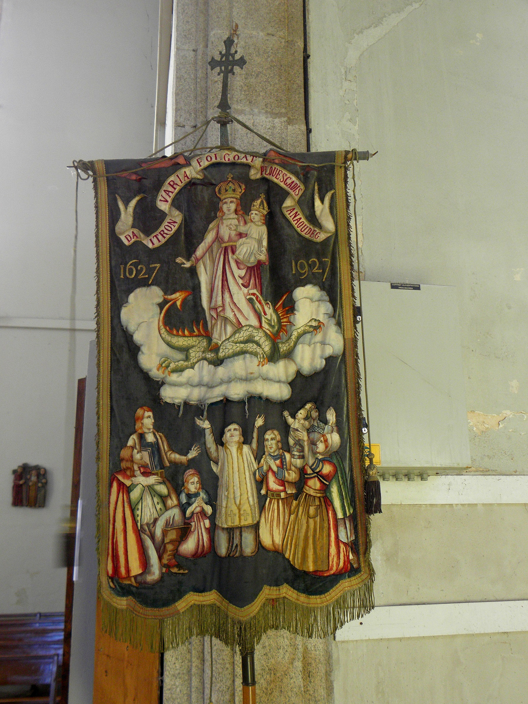 Église Saint-Pierre de Plouescat (29) : bannière de procession commémorant l'épidémie de peste de 1627.